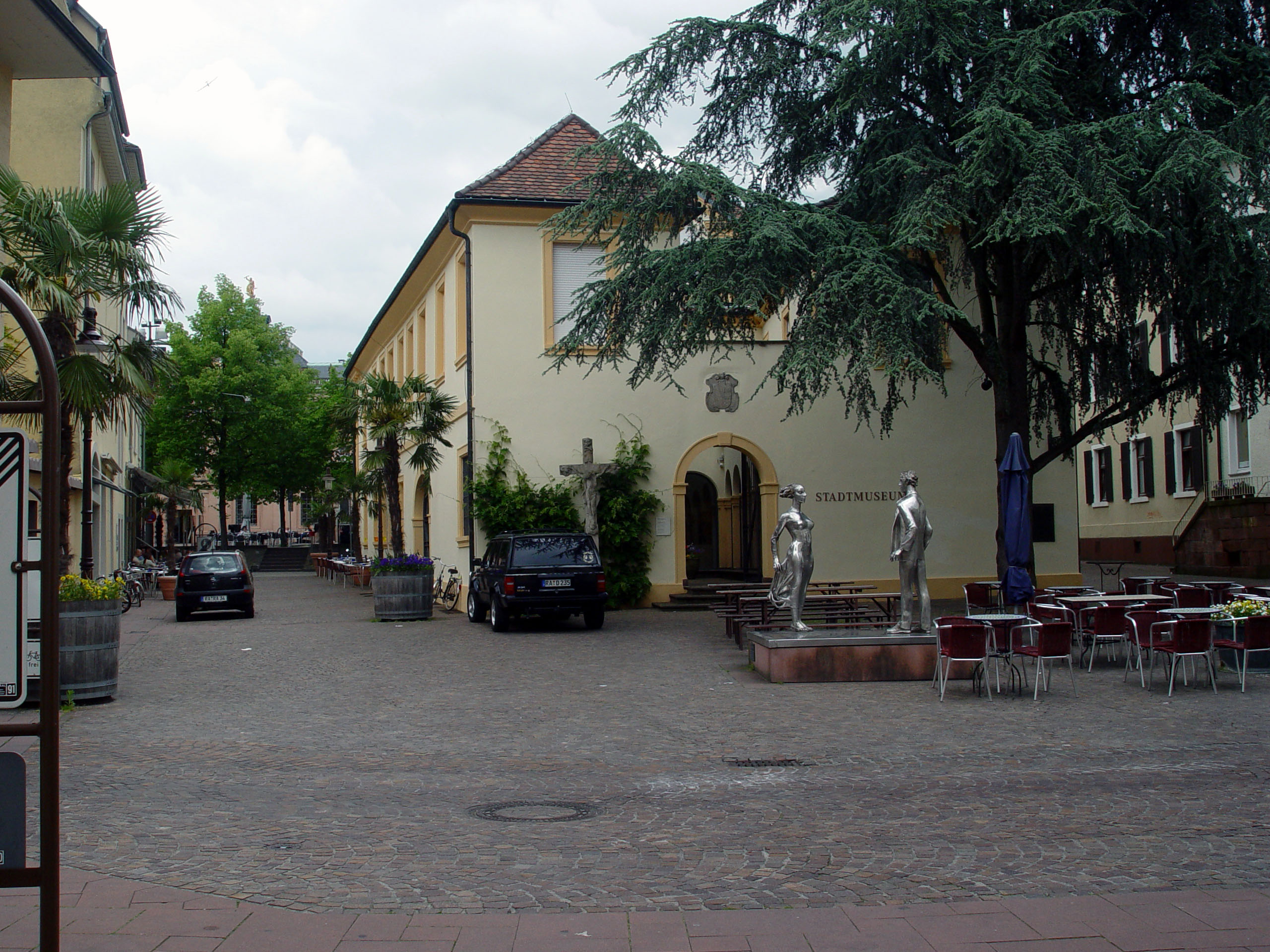 Der Faneser Platz ist ein Platz im badischen Rastatt. Anlässlich der Partnerschaft von Fano und Rastatt aus den Jahren 1985/86, wurde am 15. September 1991 in Rastatt der Faneser Platz der Öffentlichkeit übergeben. Die am 13. April 1985 von Bürgermeister Gustavo Mazzoni in Fano und am 13. September 1986 von Oberbürgermeister Franz J. Rothenbiller in Rastatt unterzeichnete Urkunde beruht auf einer langen Tradition der beiden Städte. Bereits das in Rastatt stehende Schloss wurde vom Faneser Baumeister Domenico Egidio Rossi erbaut, so verwundert es nicht, das der Platz von einem Kunstwerk des berühmten Faneser Bildhauers Giuliano Vangi geziert wird. Der Platz in der Nähe des Schlosses, ist auch der Eingang zum Rastatter Stadtmuseum mit vielen Informationen zur Geschichte der Stadt.